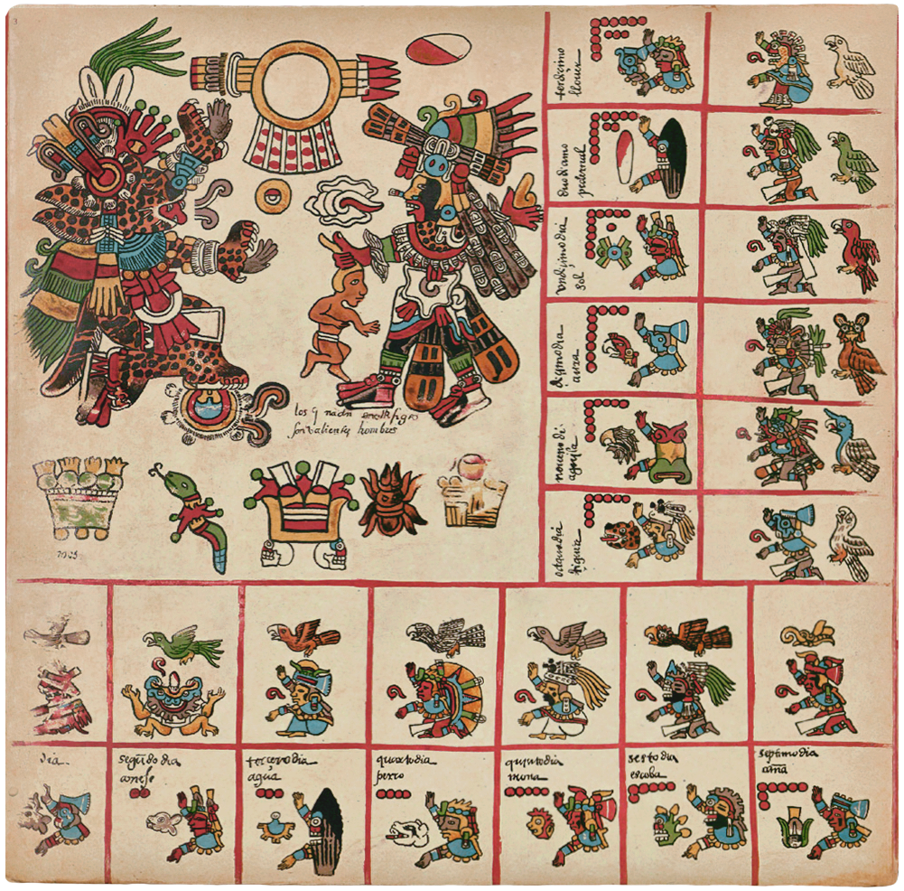 Planche 03 du codex Borbonicus. Étalonnage des couleurs en correspondance avec l'oeuvre originale.